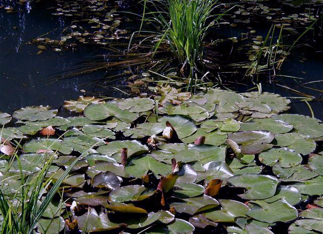 Her ses Hvid Nøkkerose og Kæmpe-Star. Branddammen i Beder.Nymphaea